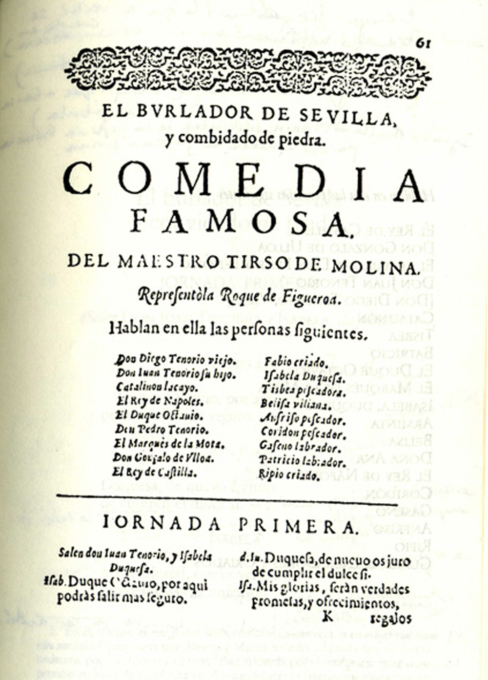 Naslovna stran dela Tirsa de Moline, v katerem je bil izoblikovan lik Don Juana